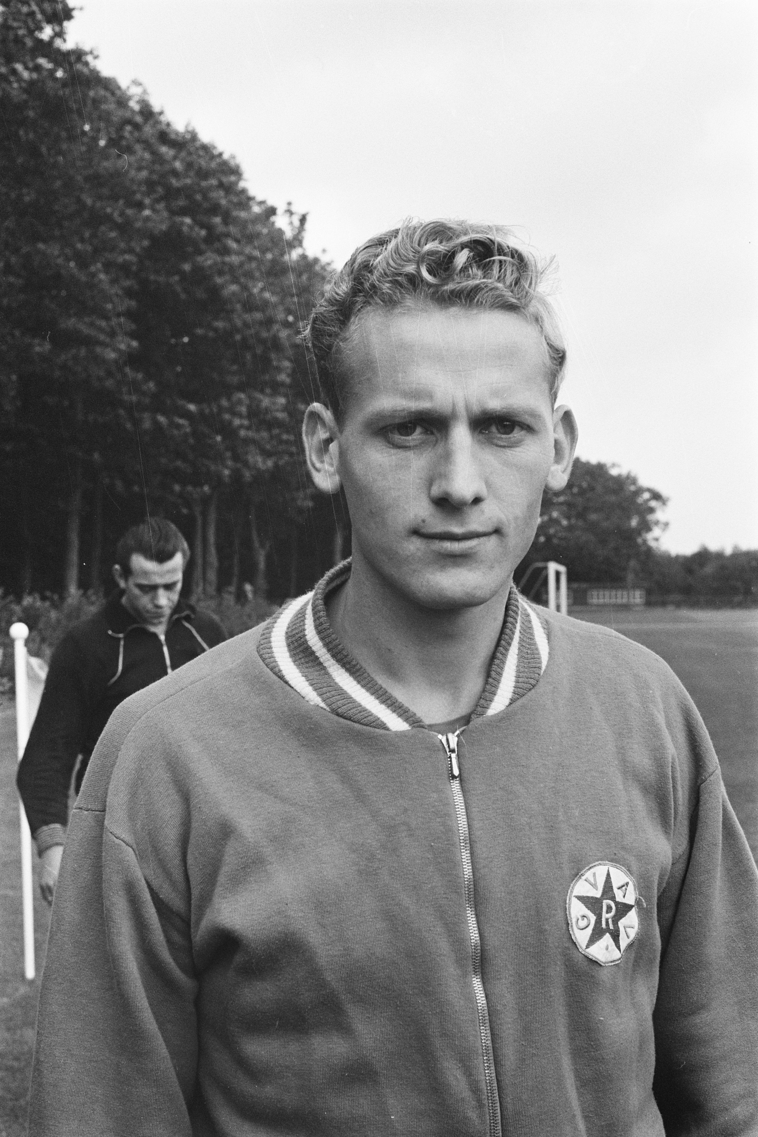 Collectie / Archief : Fotocollectie Anefo Reportage / Serie : [ onbekend ] Beschrijving : Training Nederlands elftal te Zeist. Nuninga Datum : 4 september 1963 Locatie : Utrecht, Zeist Trefwoorden : sport, voetbal Fotograaf : Pot, Harry / Anefo Auteursrechthebbende : Nationaal Archief Materiaalsoort : Negatief (zwart/wit) Nummer archiefinventaris : bekijk toegang 2.24.01.05 Bestanddeelnummer : 915-4978